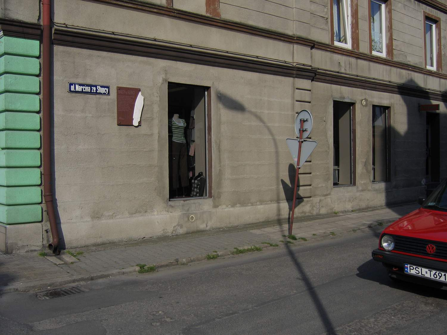 Ulica Marcina ze Słupcy, jedna z ulic odchodzących od Placu Wolności (Rynku). (foto. Marcin Majdecki)